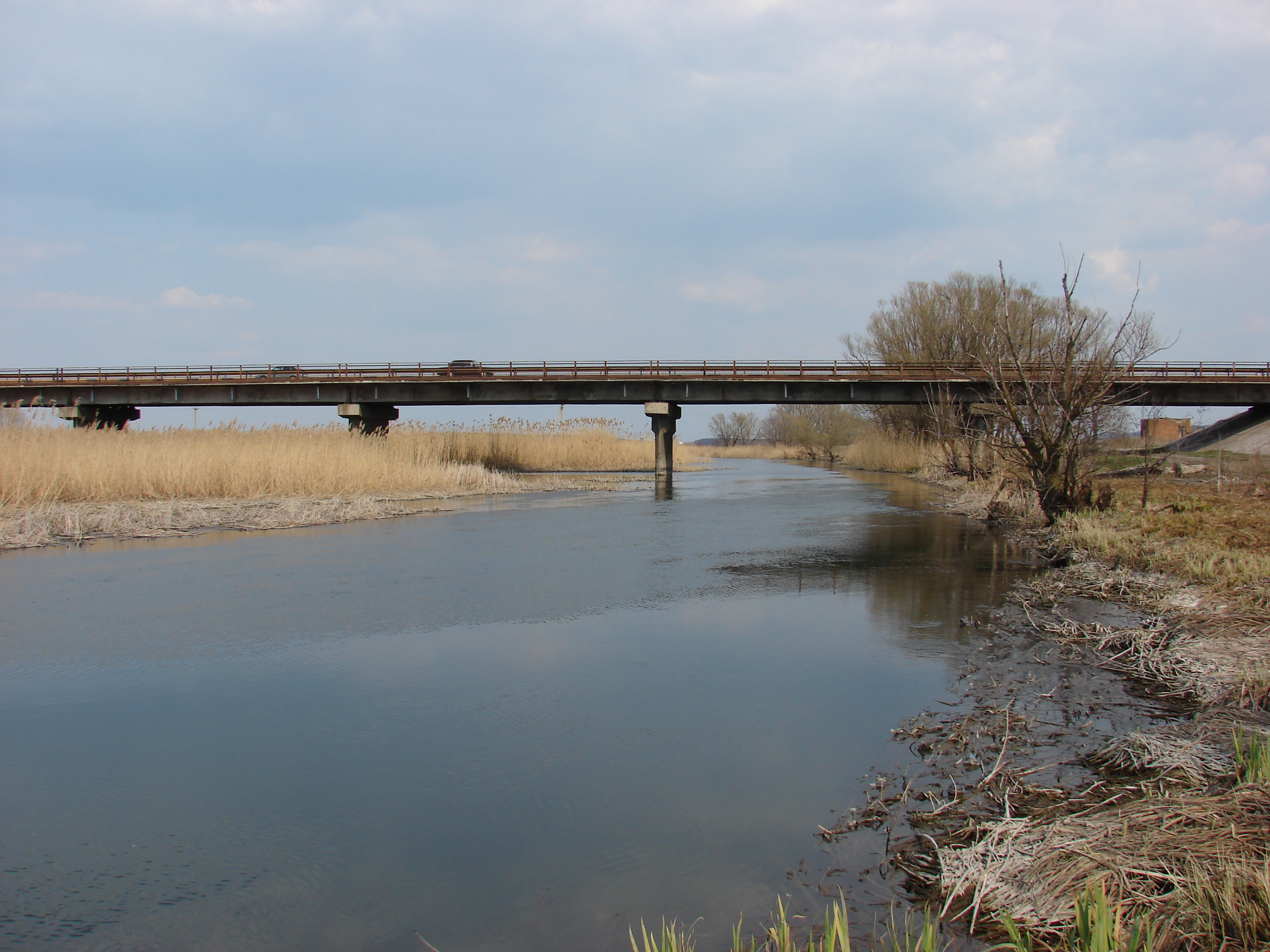 Река Потудань